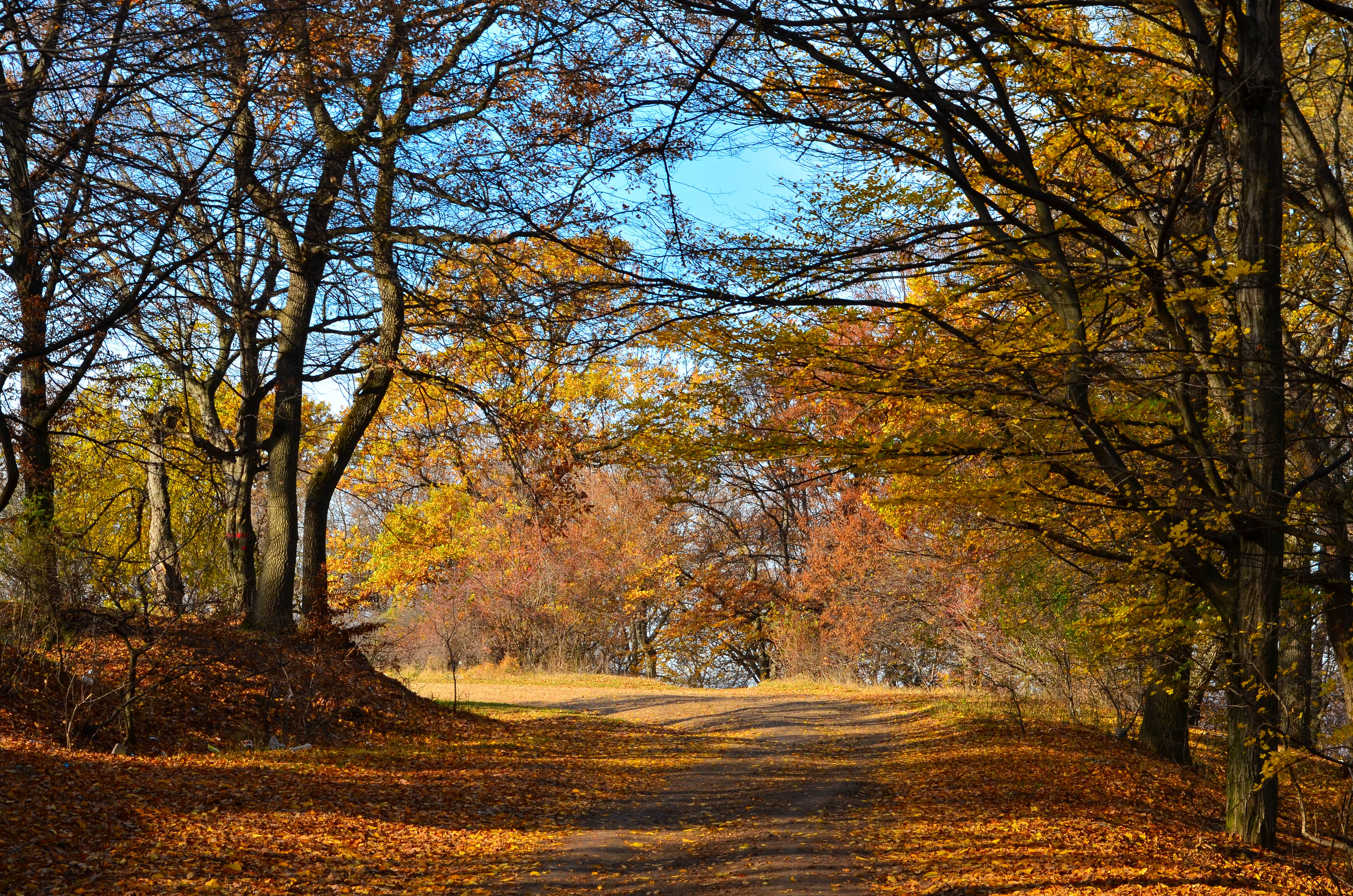 Hoia toamna/Hoia Forest autumn 2012